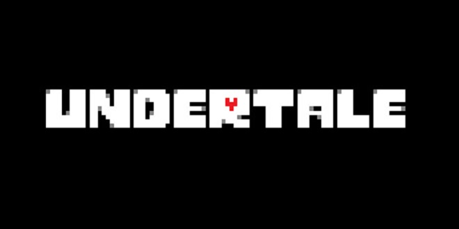 Logo du jeu Undertale.